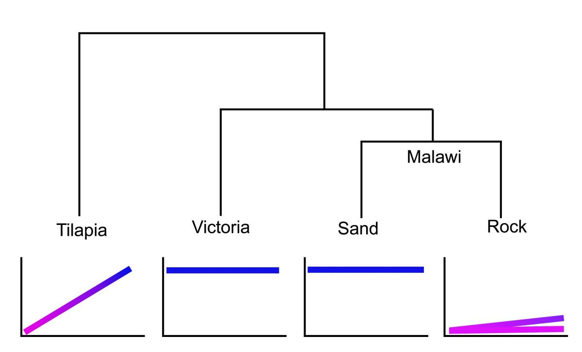 Sensibilités visuelles influencées par les changements hétérochroniques dans l'expression des gènes d'opsine, représentées dans une phylogénie générale des cichlidés